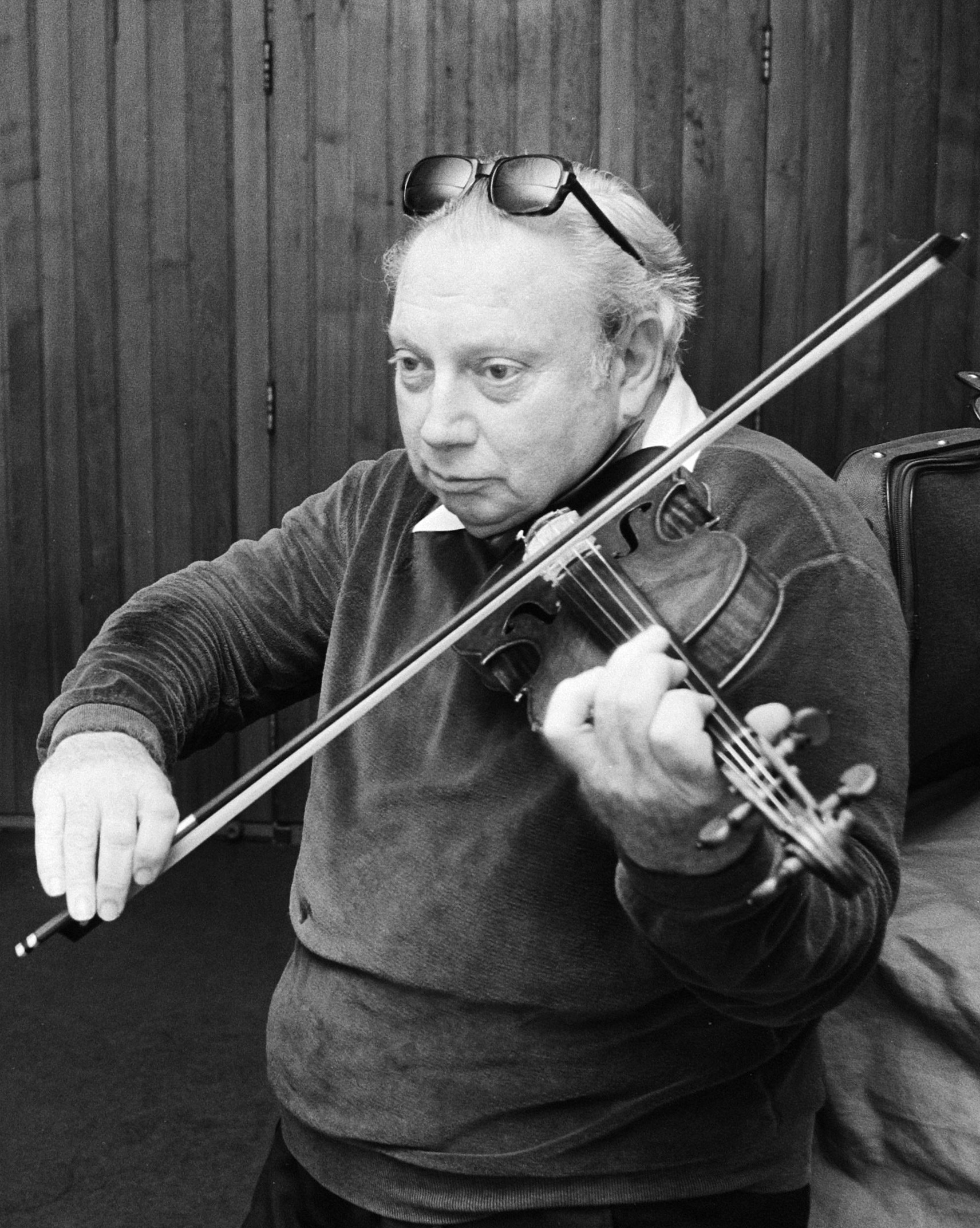 Violist Isaac Stern speelt bij Rotterdam Philharmonisch orkest